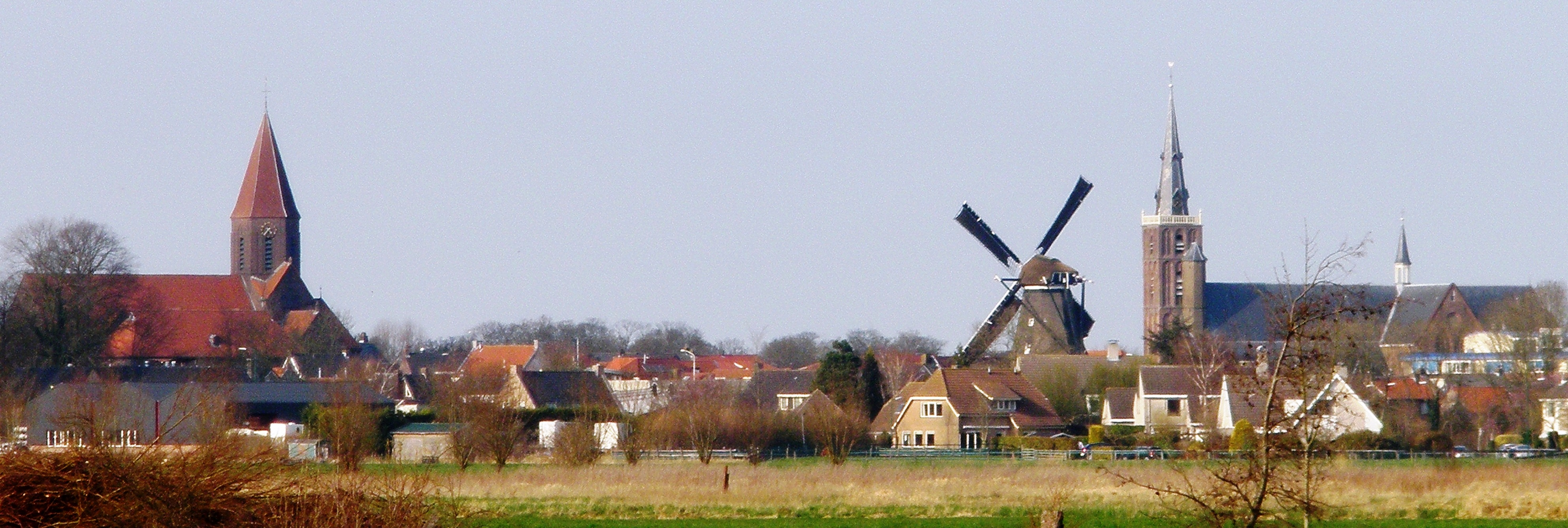 De skyline van Montfoort, gezien vanaf de N204 richting Benschop.